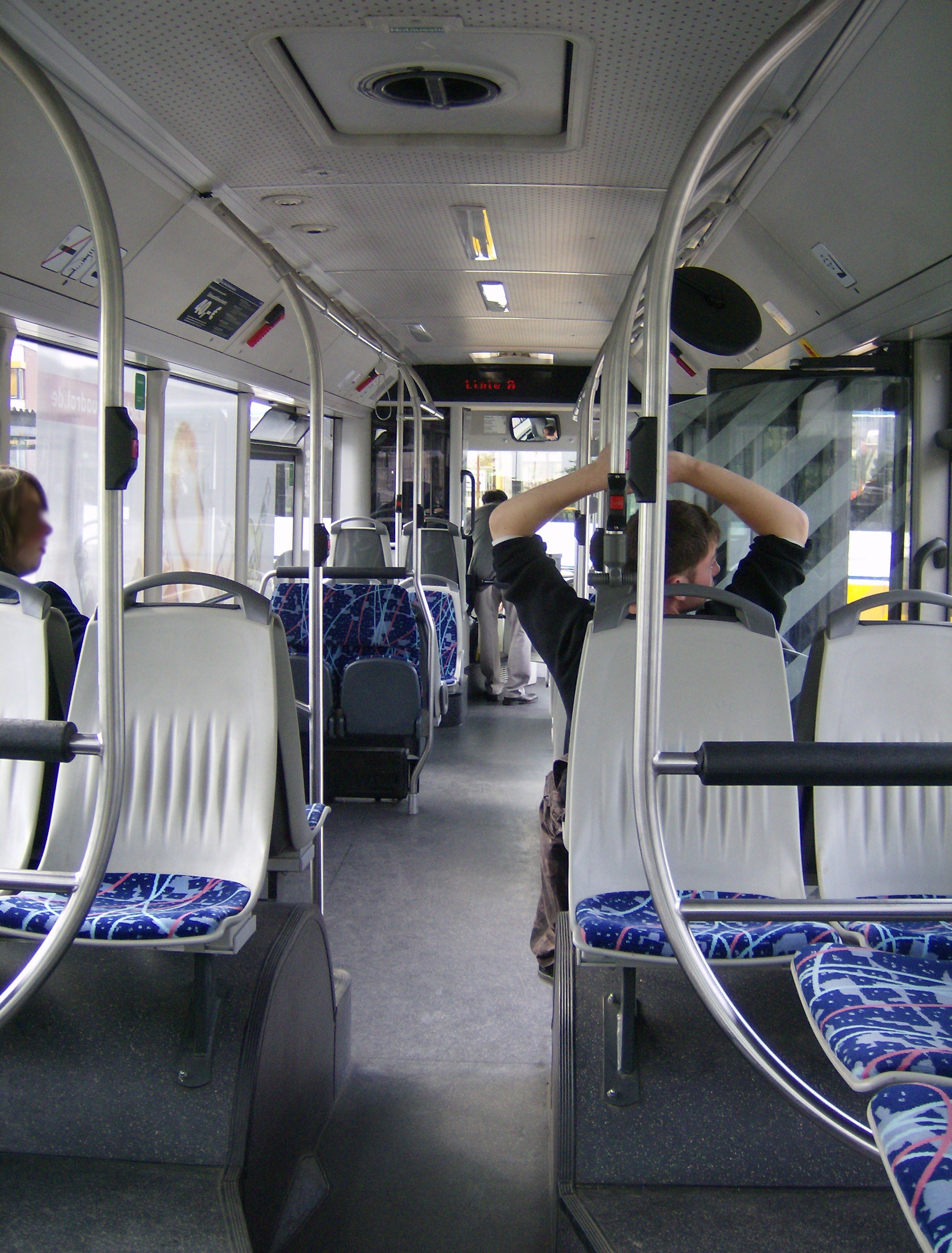 Innenansicht eines Buses der DADINA